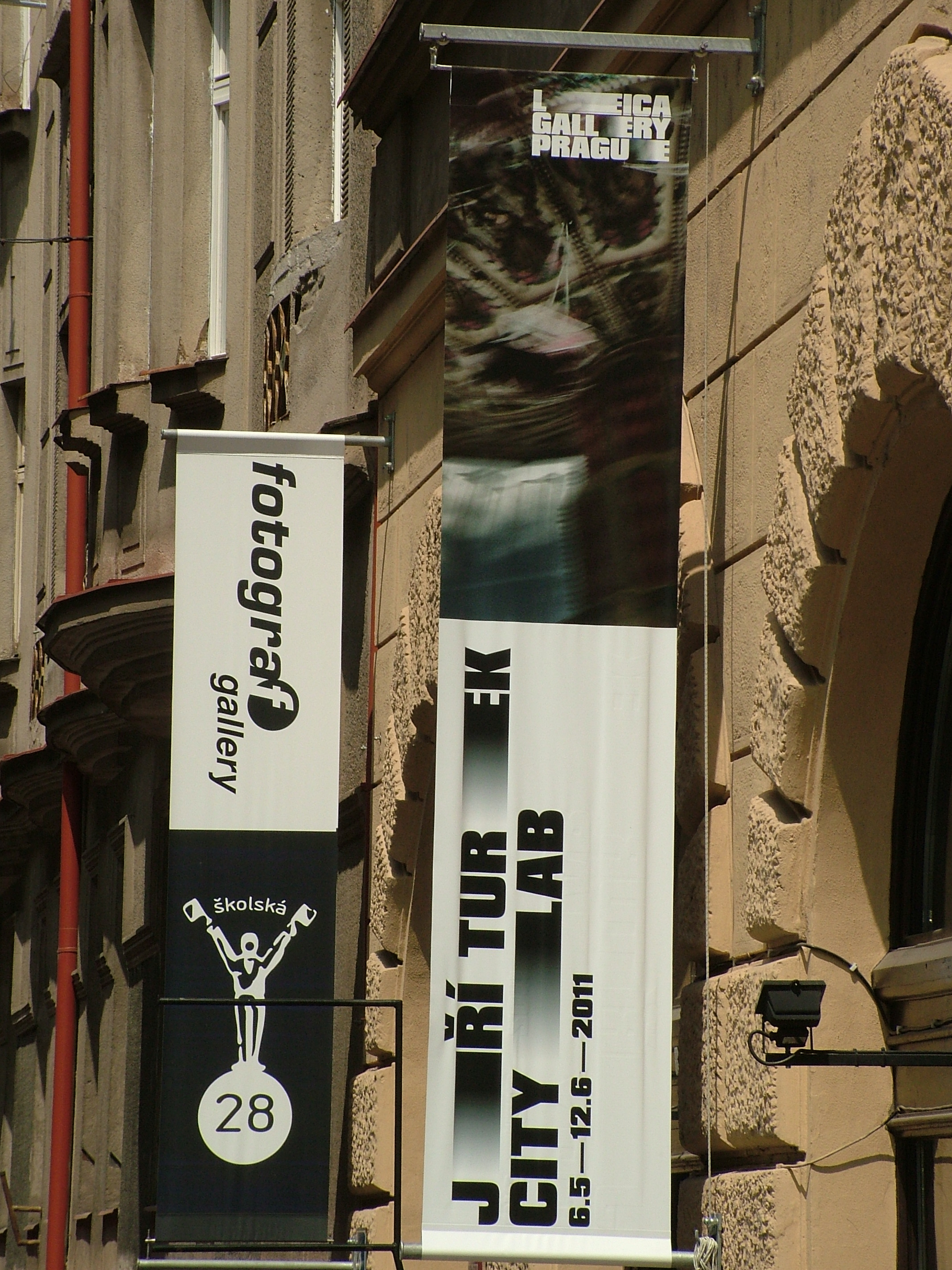 Jiří Turek: Výstava projektu cityLAB ve fotografické galerii Leica Gallery Prague obsahuje snímky z 12 evropských metropolí.